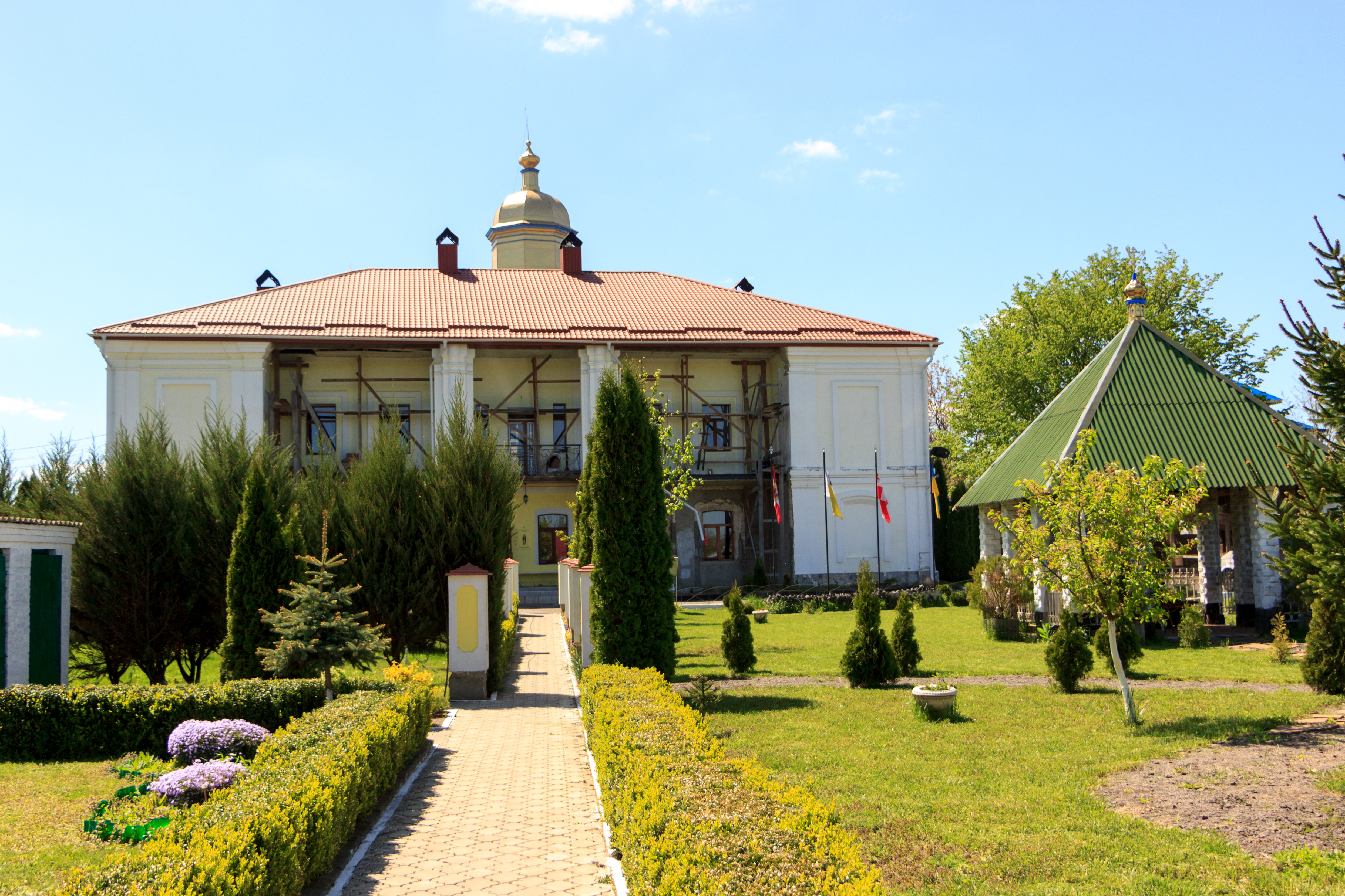 Митрополичі Палати